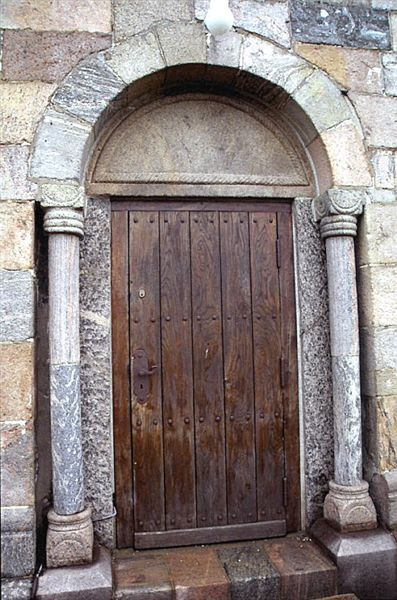 Vindum Kirke, Viborg Kommune, nordportal